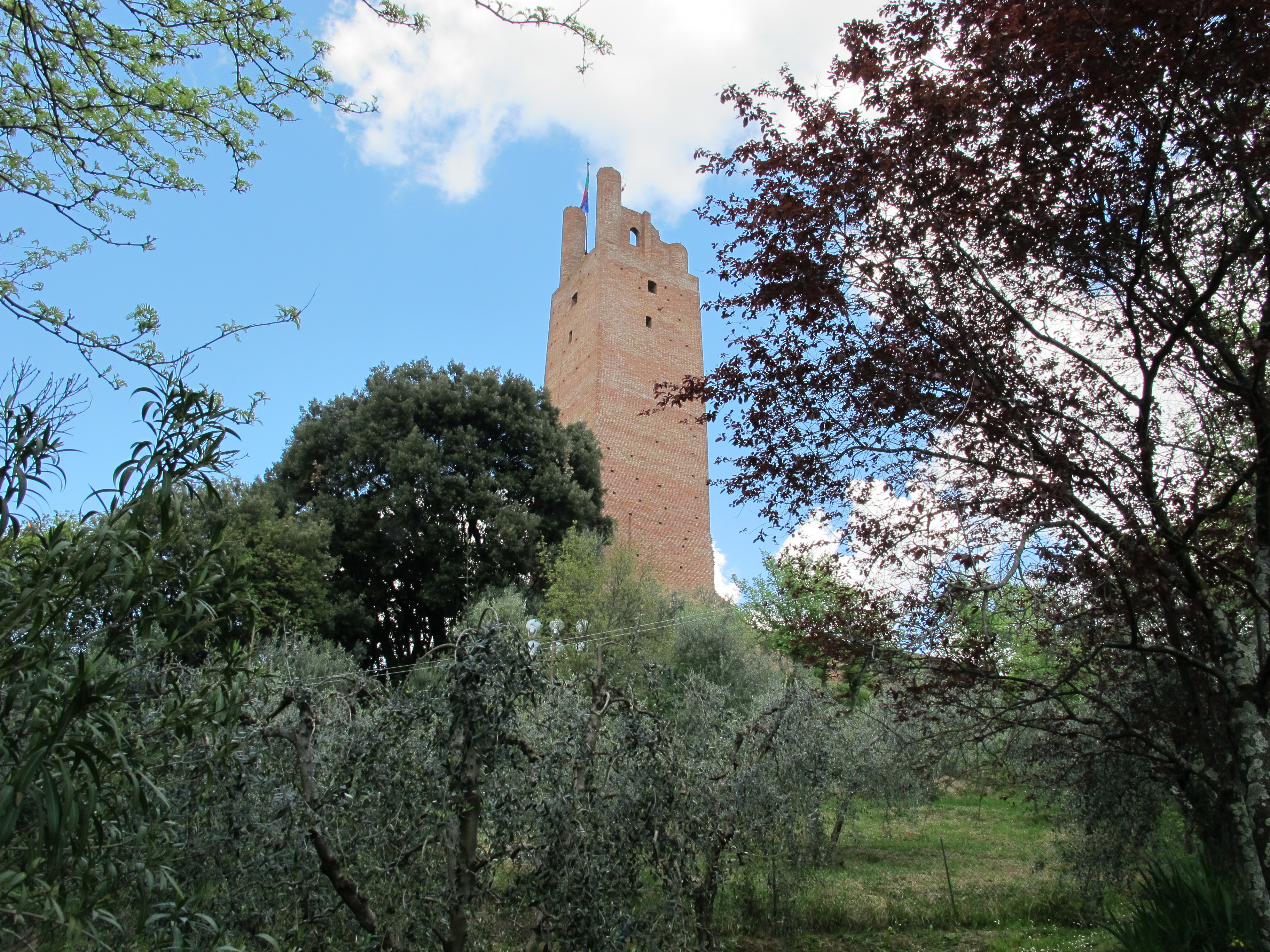 Rocca di federico